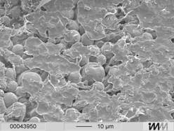 Struktura materiálu po odsříknutí